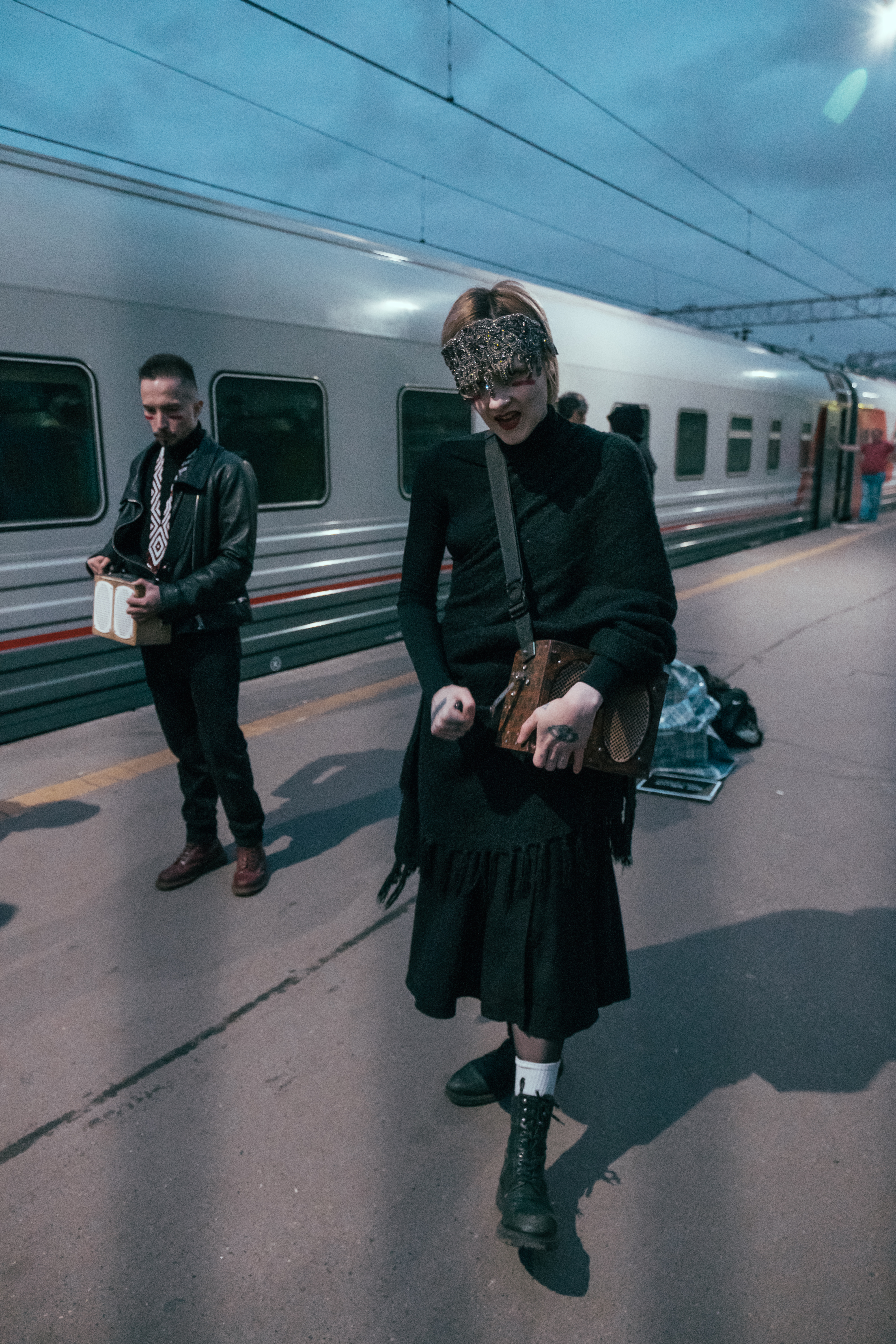 Саша Старость и Стас Горев во время проведения "техно-ритула" на премьере иммерсивного спектакля "Рейв №228" 28 сентября 2019 года в Москве.